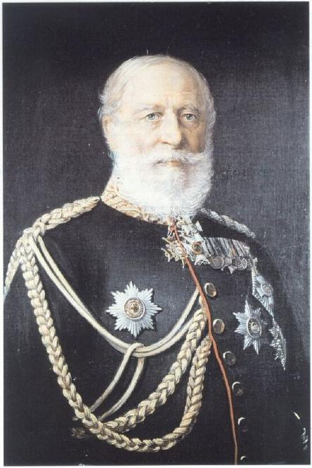 Johann Jacob Baeyer (1794–1885), Offizier im preußischen Generalstab